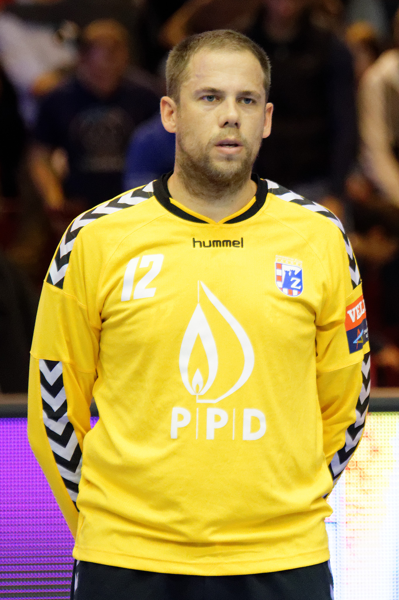 Rencontre de phase de groupe de la ligue des champions 2015-16 entre le PSG et le RK Zagreb. A la Halle Carpentier (Paris), le 11 ocotbre 2015.